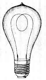 Tegning af glødelampe